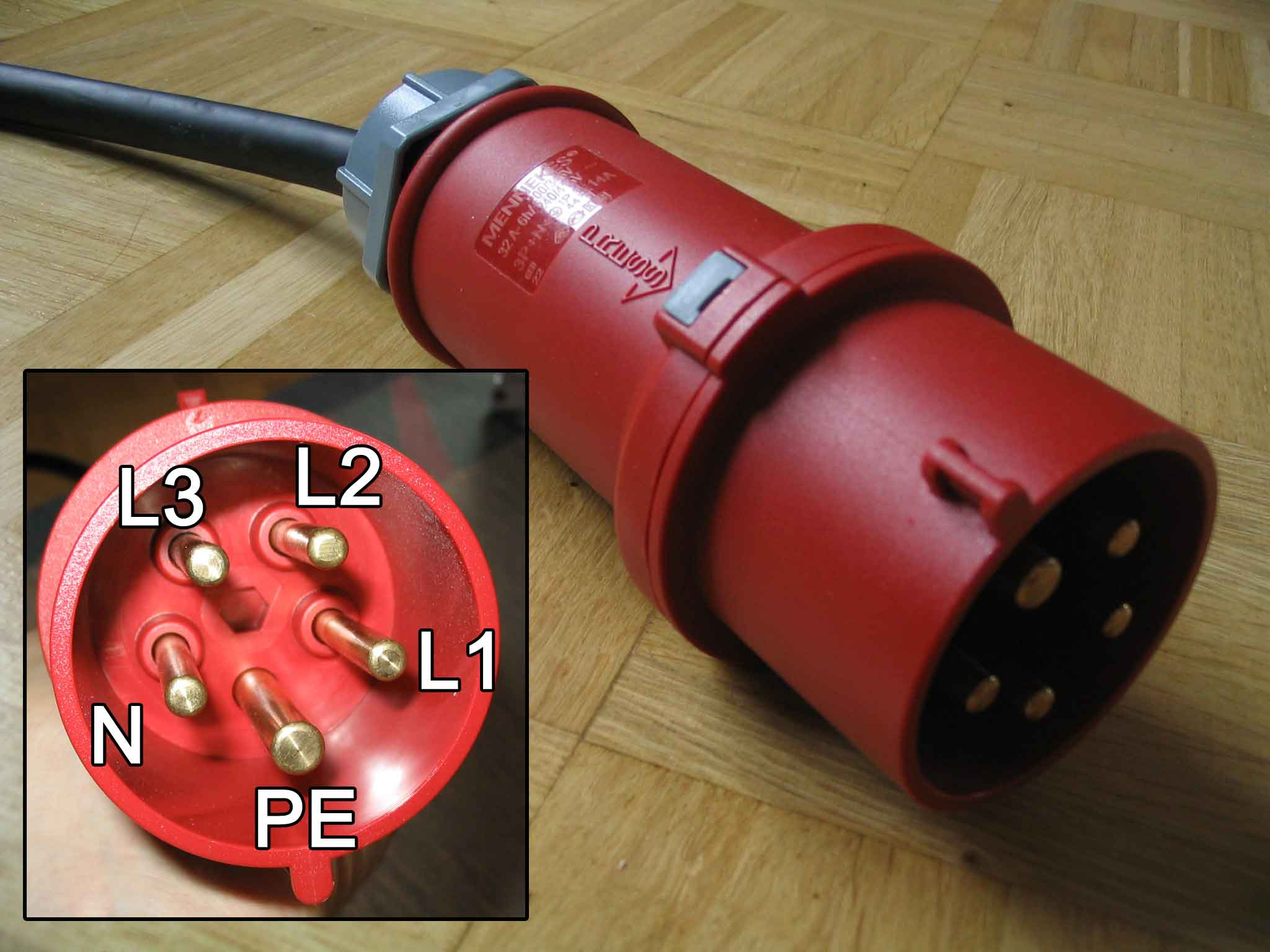 32A CEE-Stecker der Firma Mennekes, IP Code IP44 und damit Spritzwassergeschützt. Wackernheim